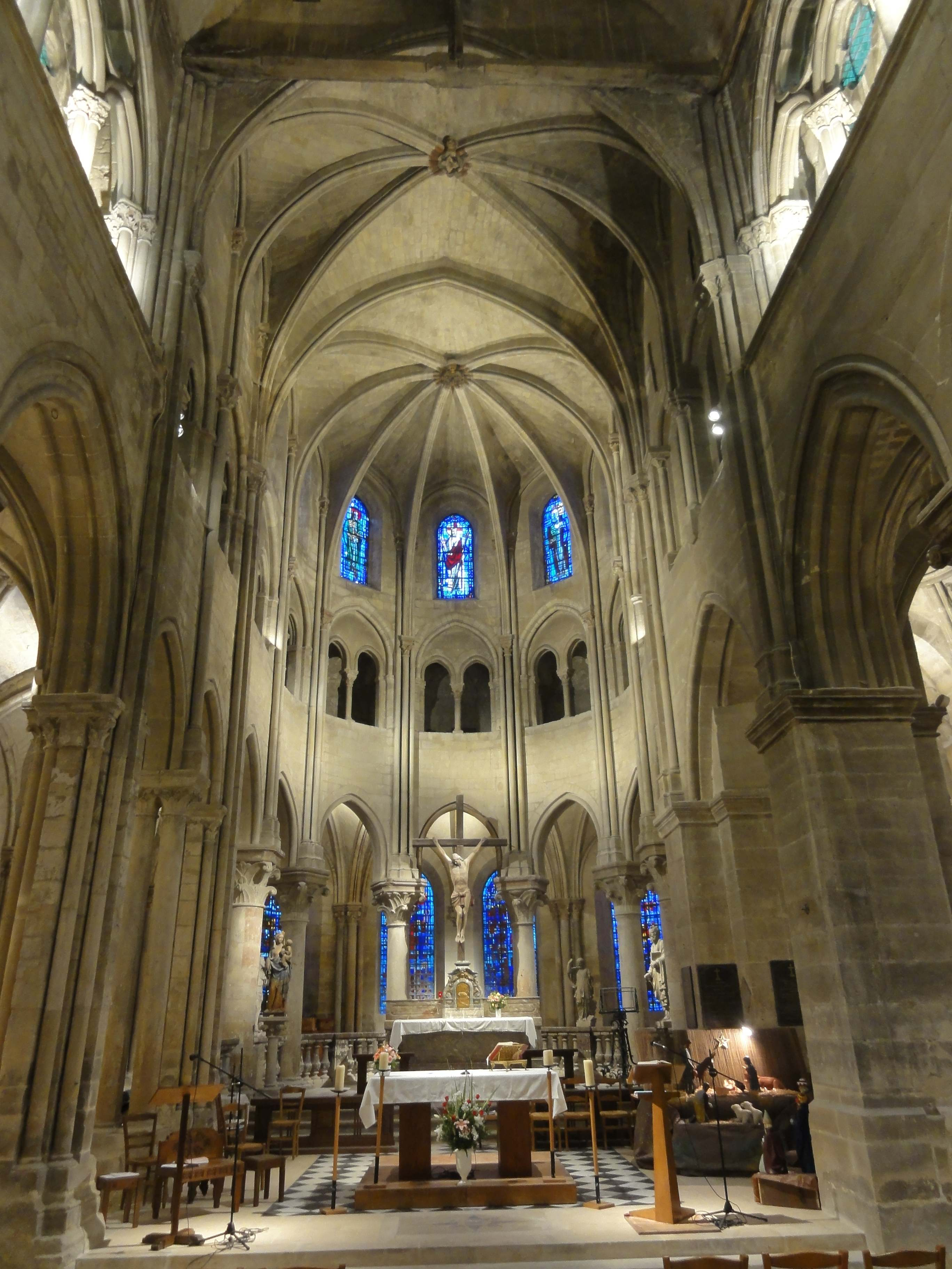 Intérieur de l'église - voir titre.